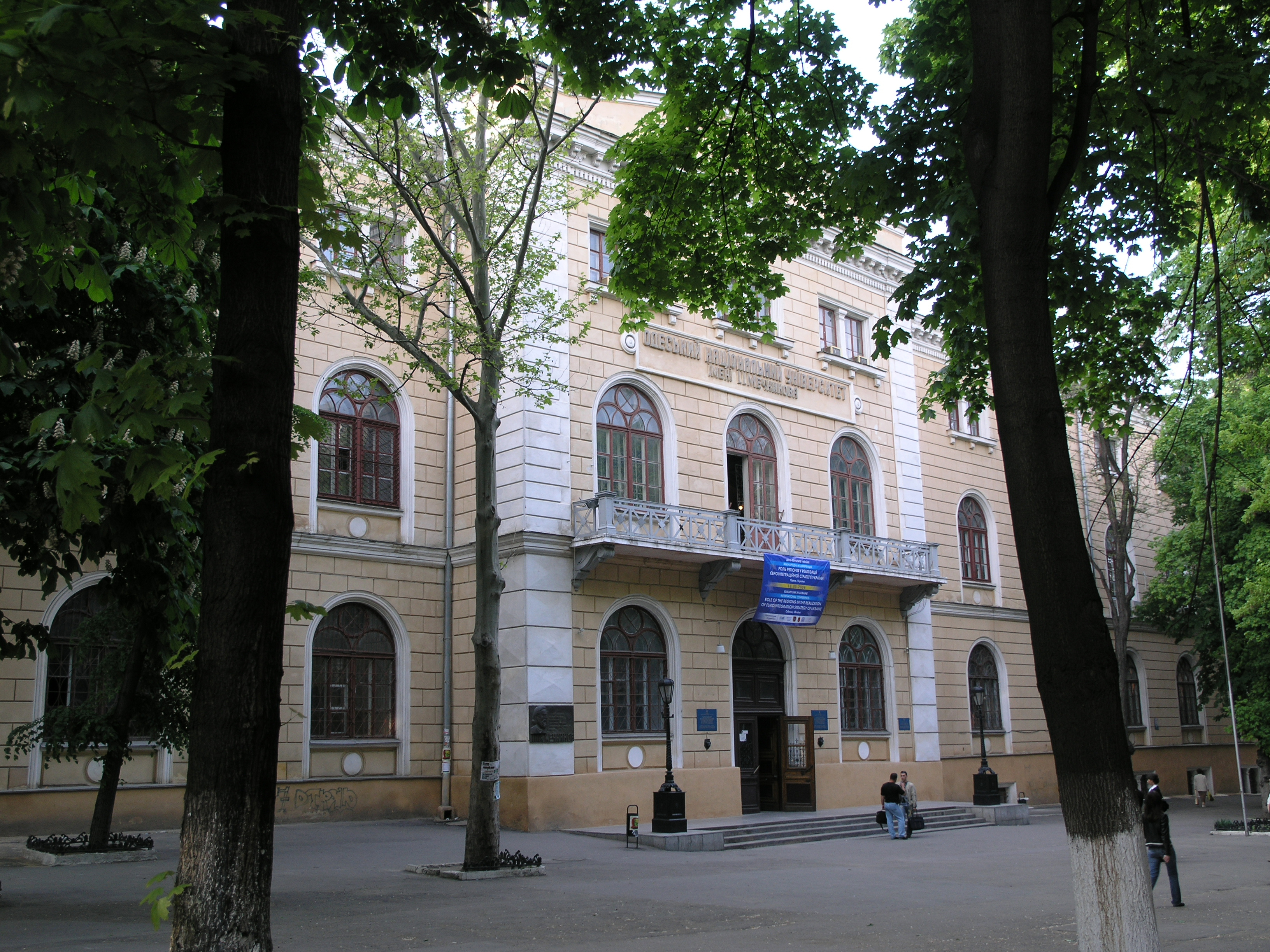 Україна, Одеса - Будівля Рішельєвського ліцею(Новоросійського університету),в якому: - начався та працював Д.К. Заболотний - академік, мікробіолог та епідеміолог, президент АН УРСР;- робітники зв’язку прийняли статут спілки та провели обрання делегатів на з’їзд портовиків